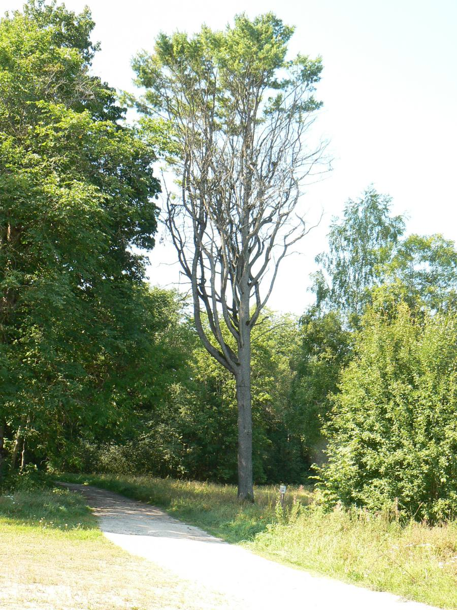 Valli valge mänd